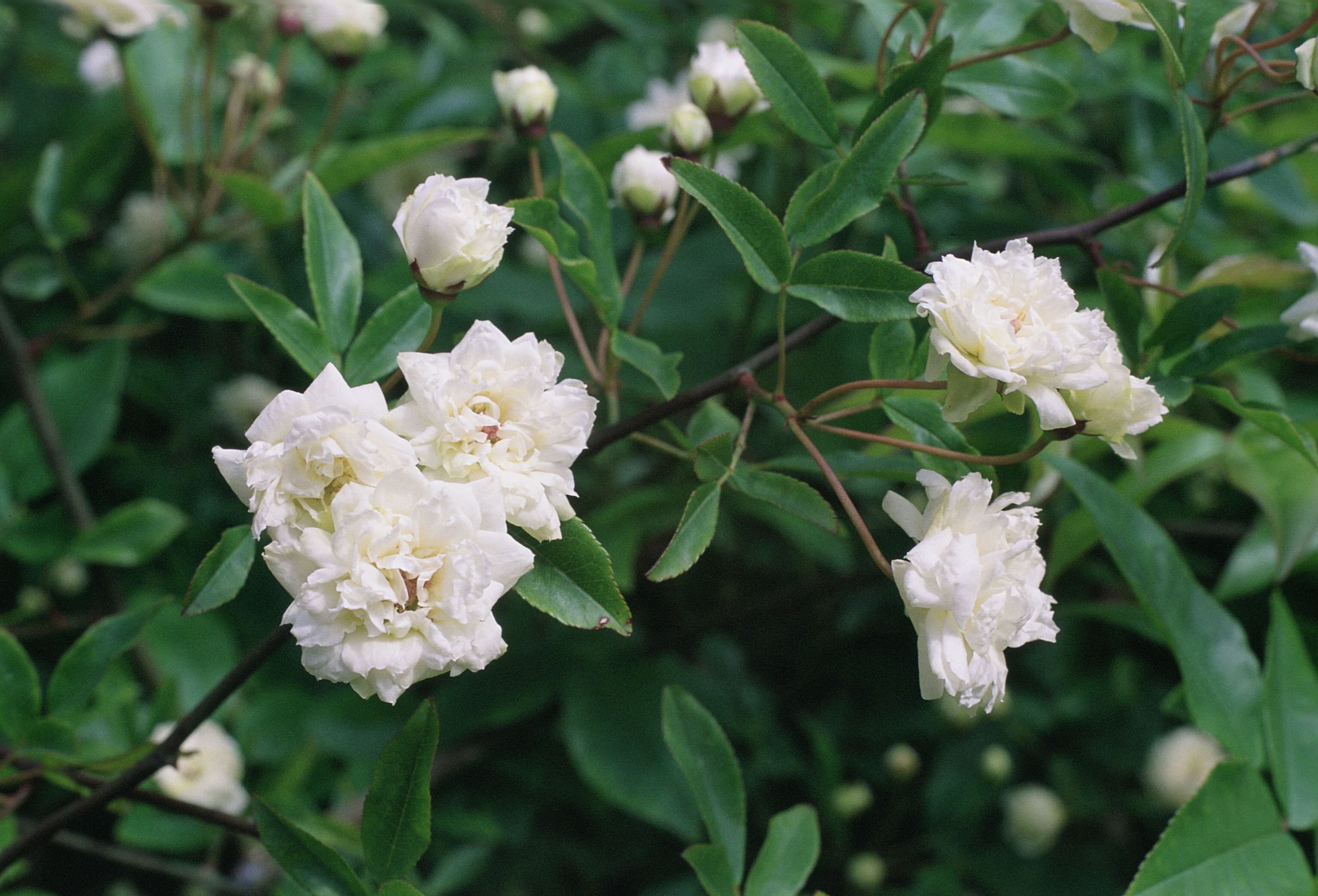 Rosa banksiae, sect. Banksianae. Real Jardín Botánico, Madrid, abril 1988, A. Barra.